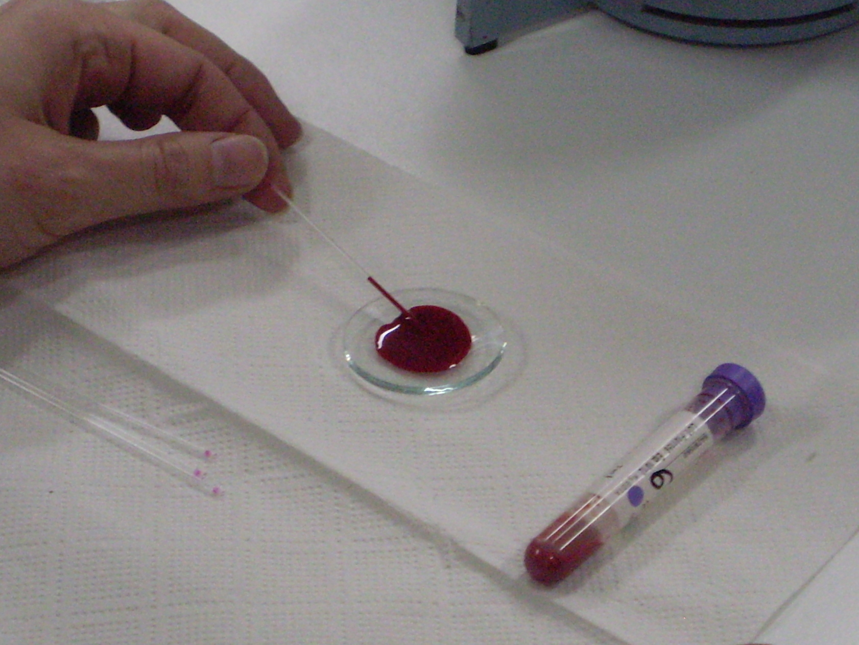 wirówka do badania hematokrytu